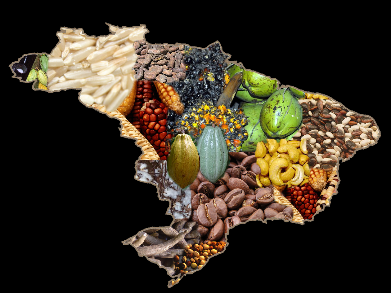 Mapa alegórico dos produtos agrícolas brasileiros.